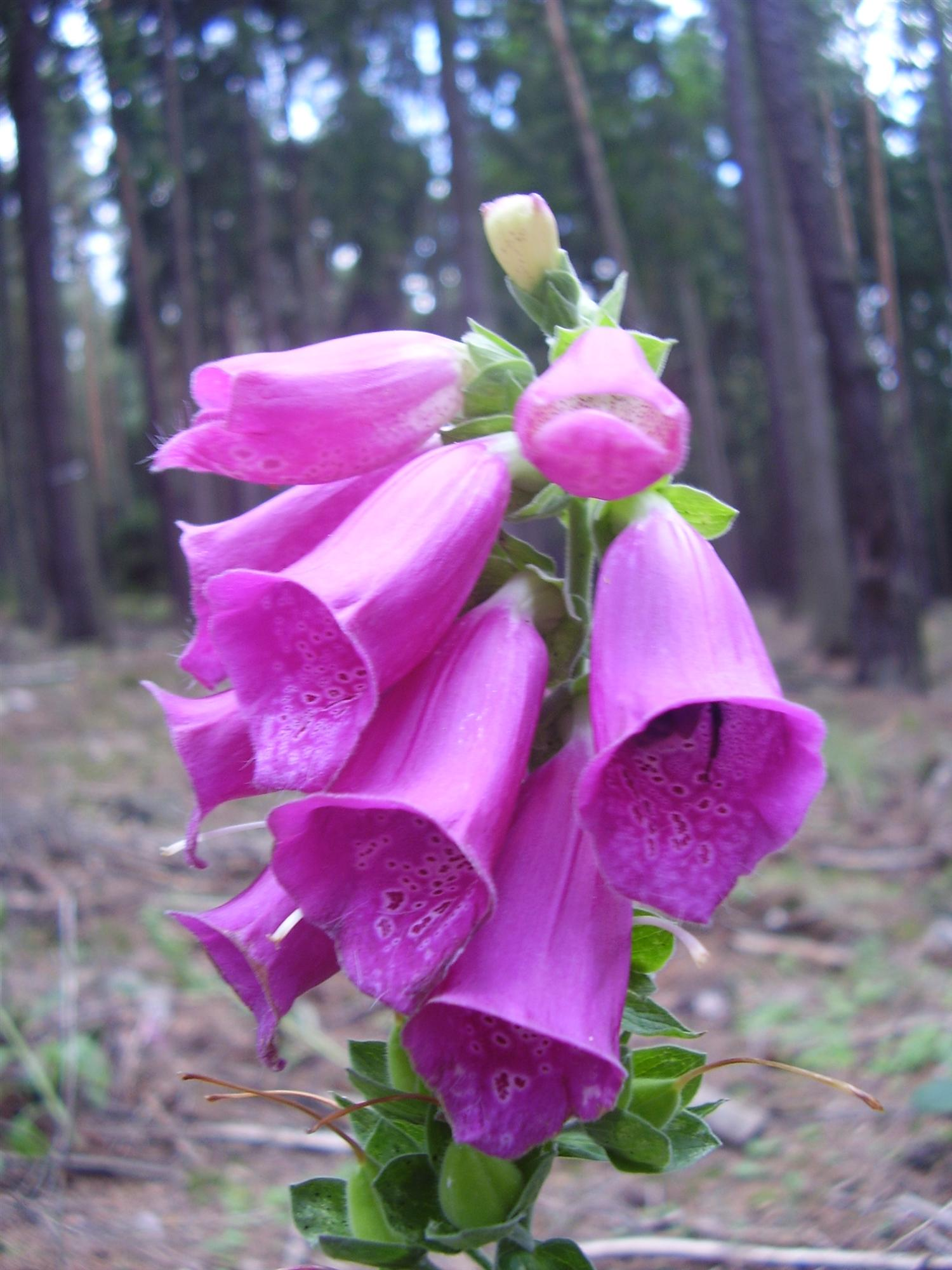 Náprstník červený (Digitalis purpurea